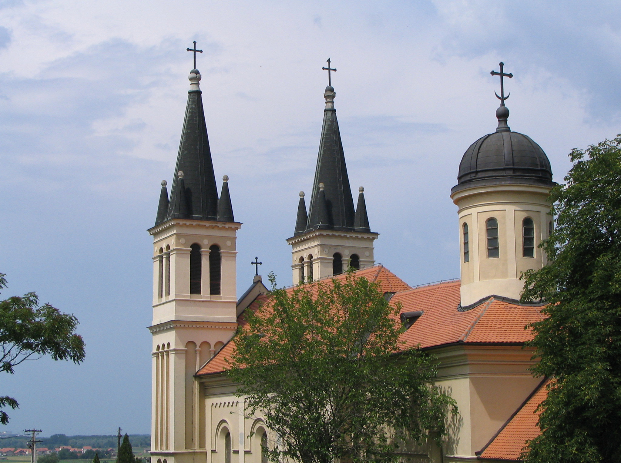 Апсидална страна цекве са крстом и полумесецом (Црква Снежне Госпе на Текијама) фото: Михаило Грбић 7. јуни 2007.